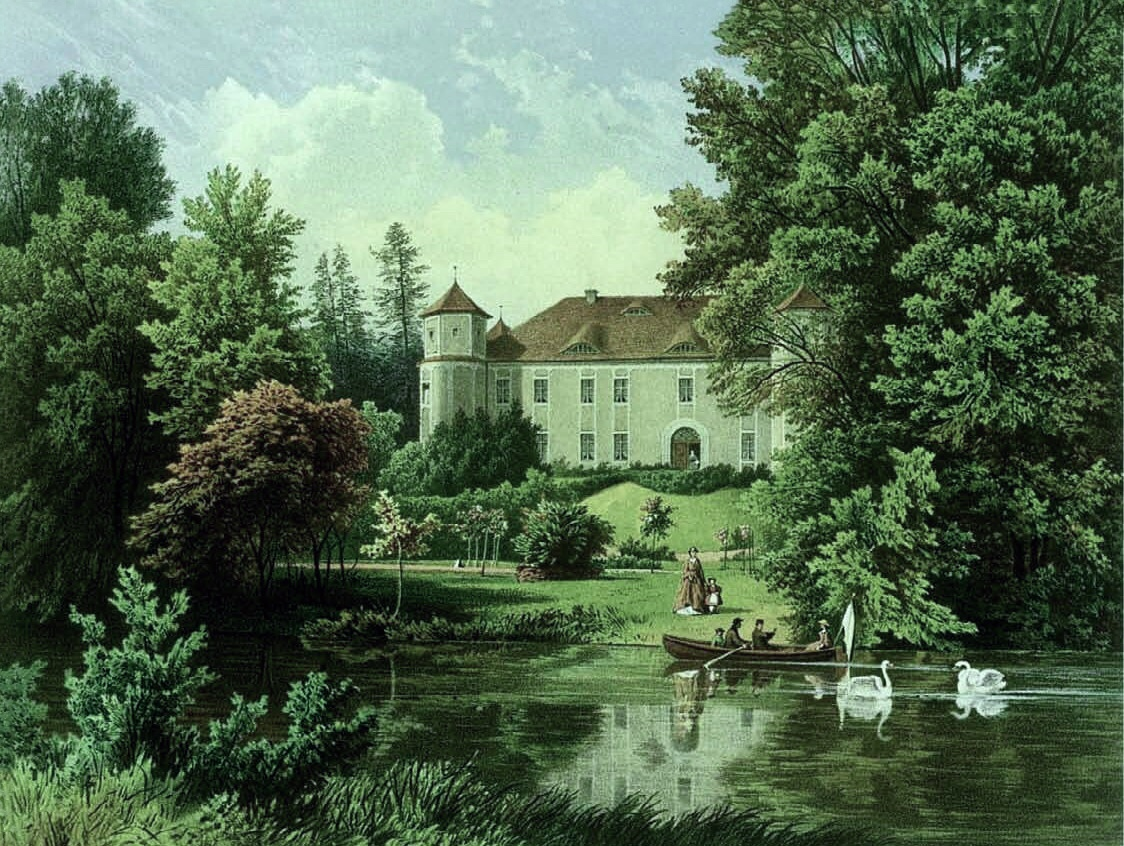 Gutshaus Deutsch-Jägel, Kreis Strehlen, Provinz Schlesien